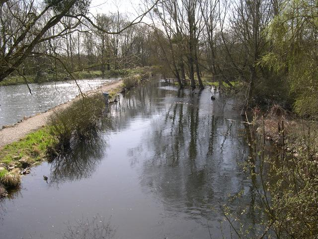 La Conie - Photo prise sur la commune de Nottonvile entre La Cheniardière et Nottonville par Olivier Thauvin.